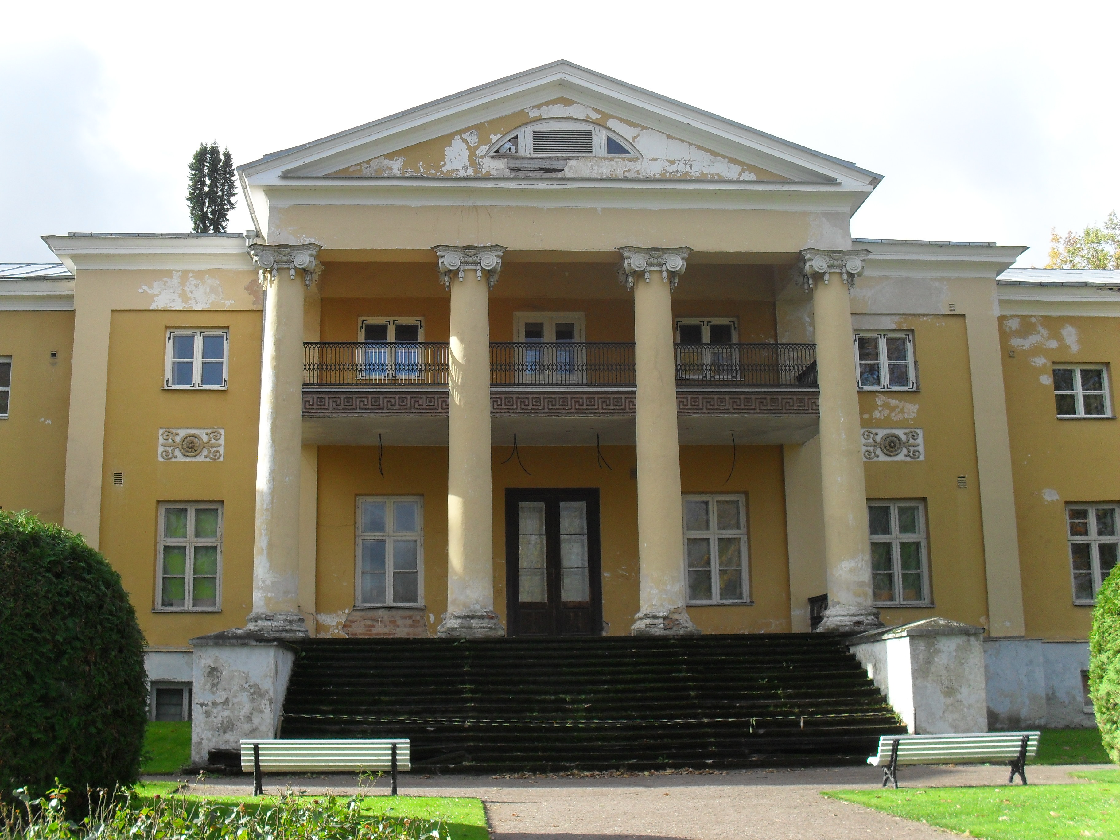 Räpina mõisa peahoone